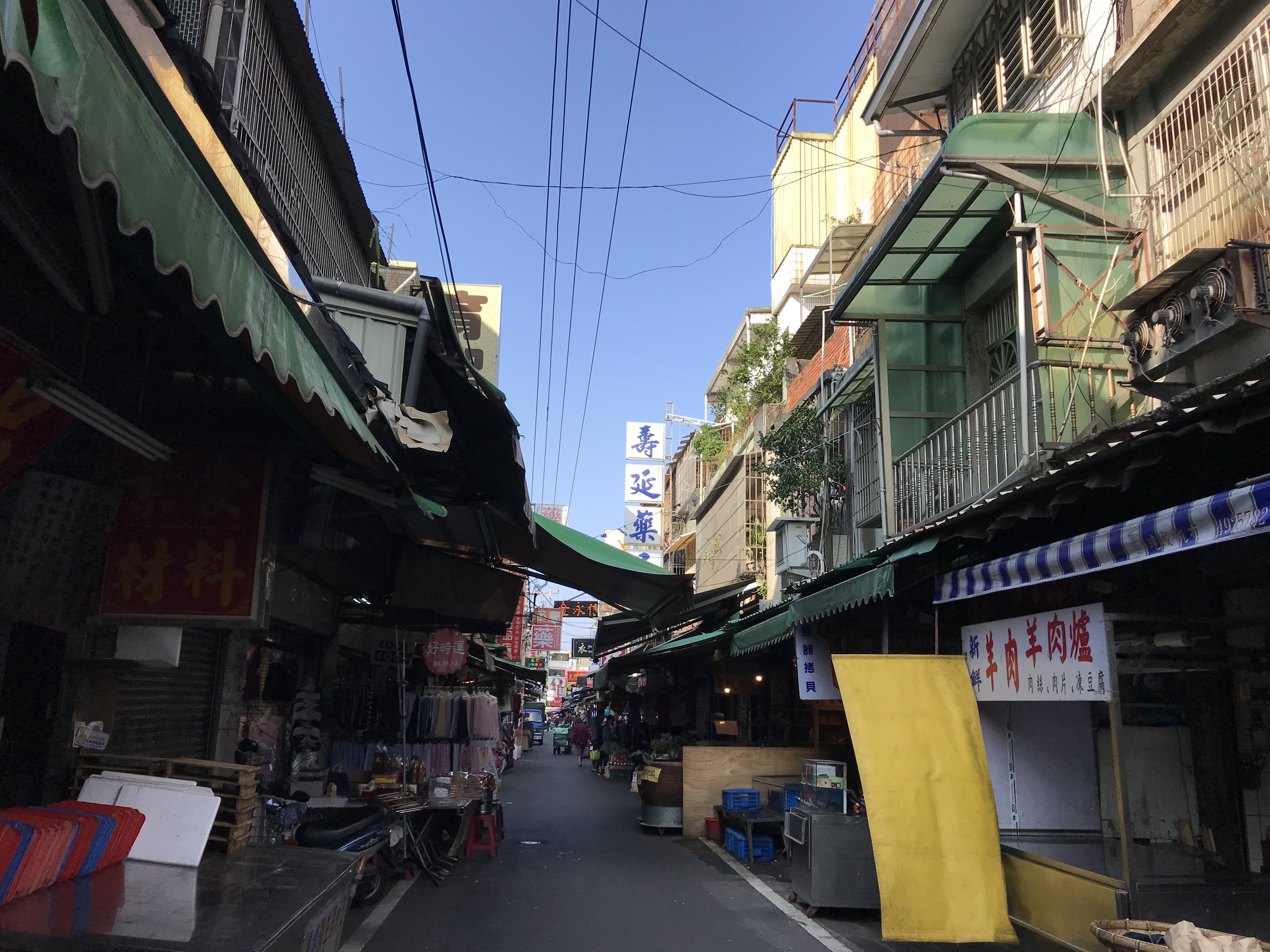 中文（台灣）: 忠貞市場一景